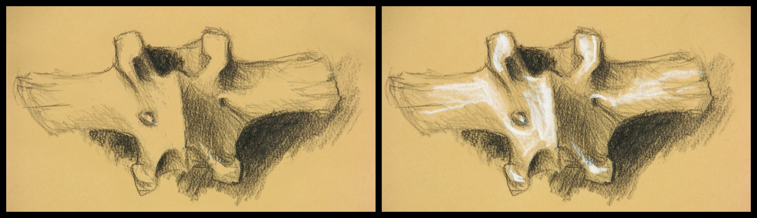 disegno a matita di una vertebra, con lumeggiature a pastello